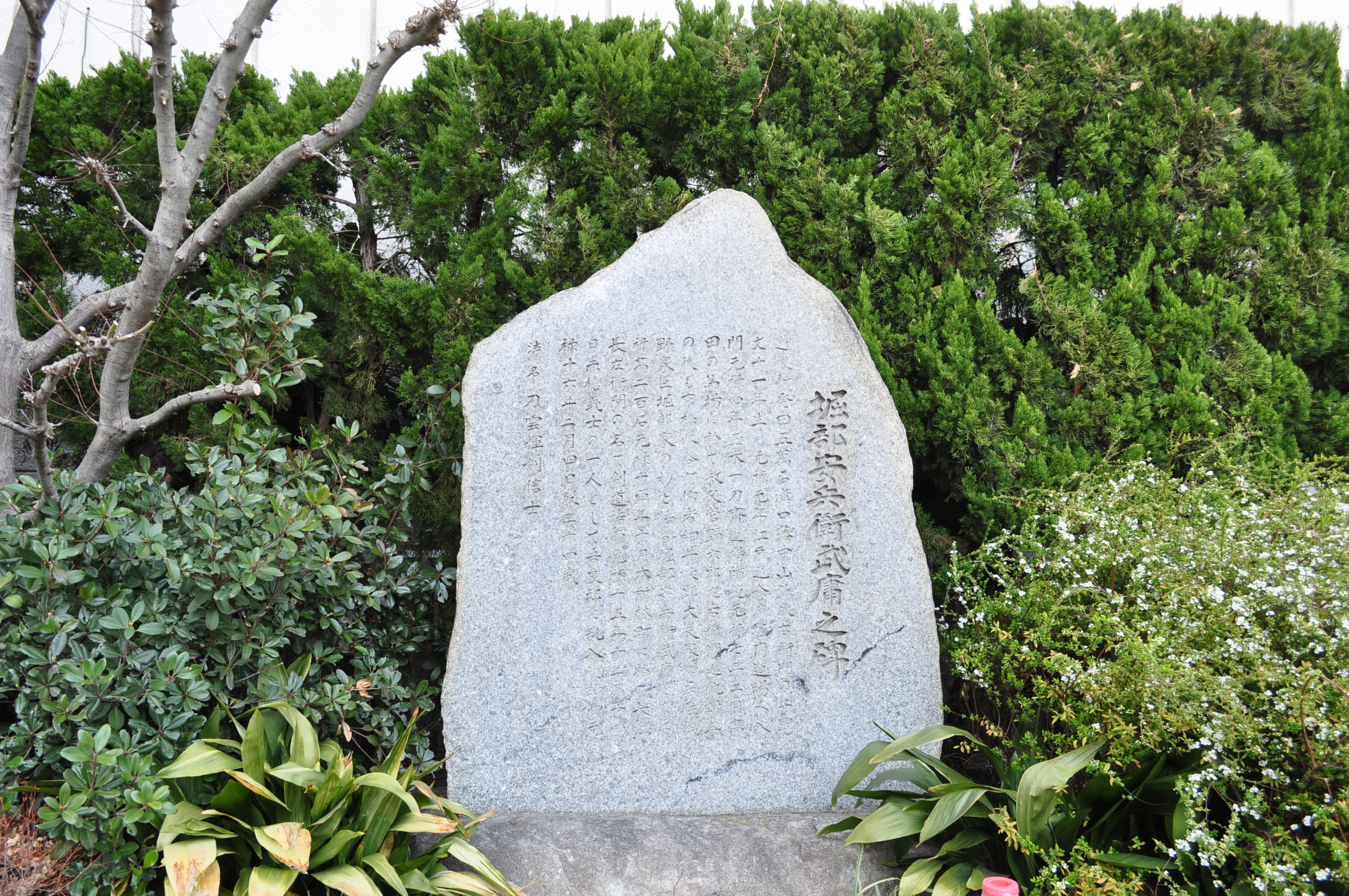 堀部安兵衛の碑